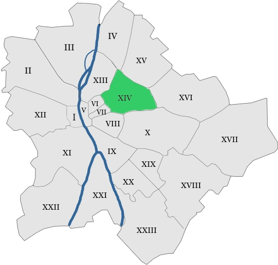 map hungary budapest district 14